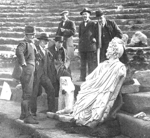 Fotografía que muestra al torero español Ricardo Torres Reina «Bombita» visitando con unos amigos el teatro romano de Mérida en 1913